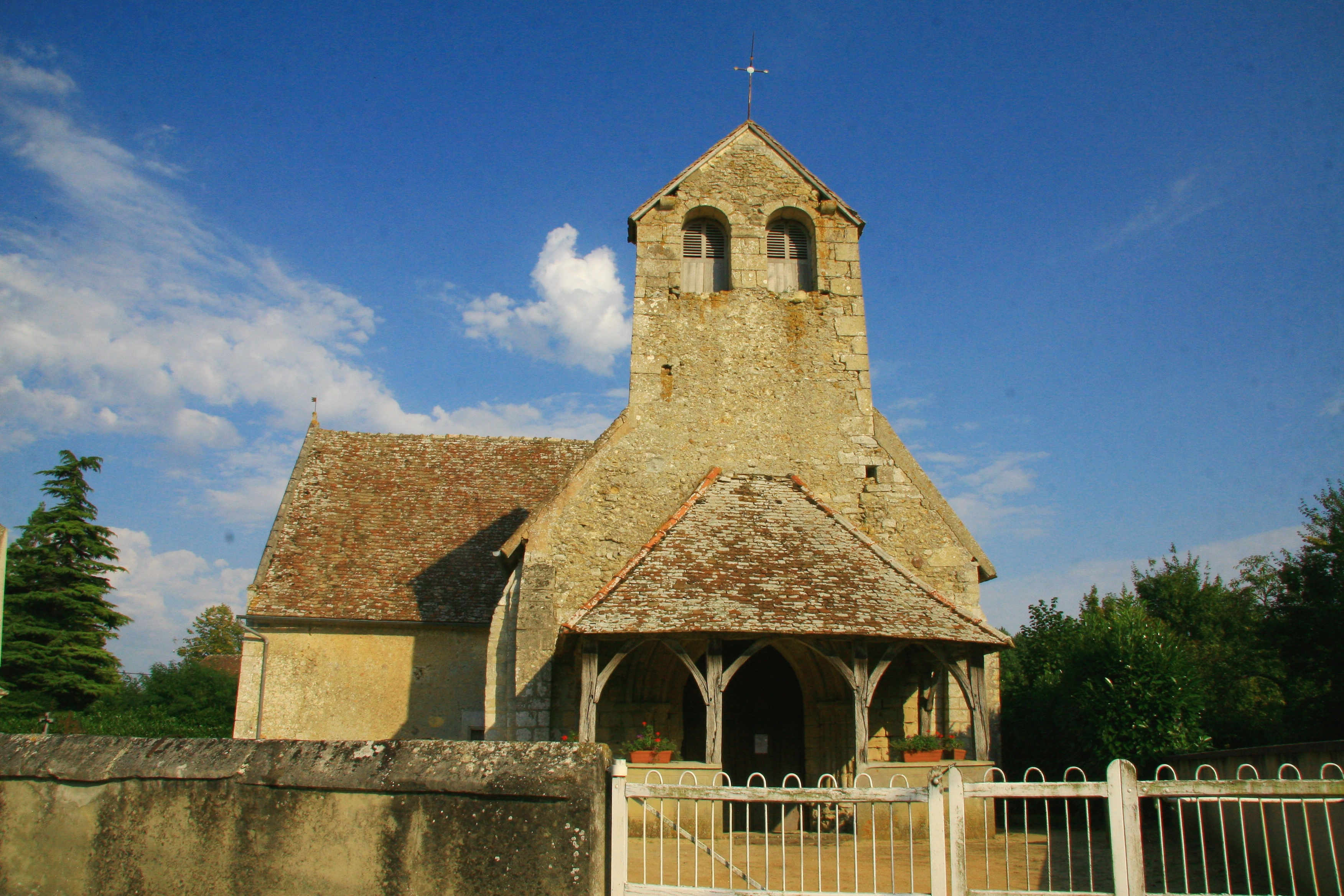 Église Saint-Jouin de Peray, Sarthe, Pays de la Loire, France